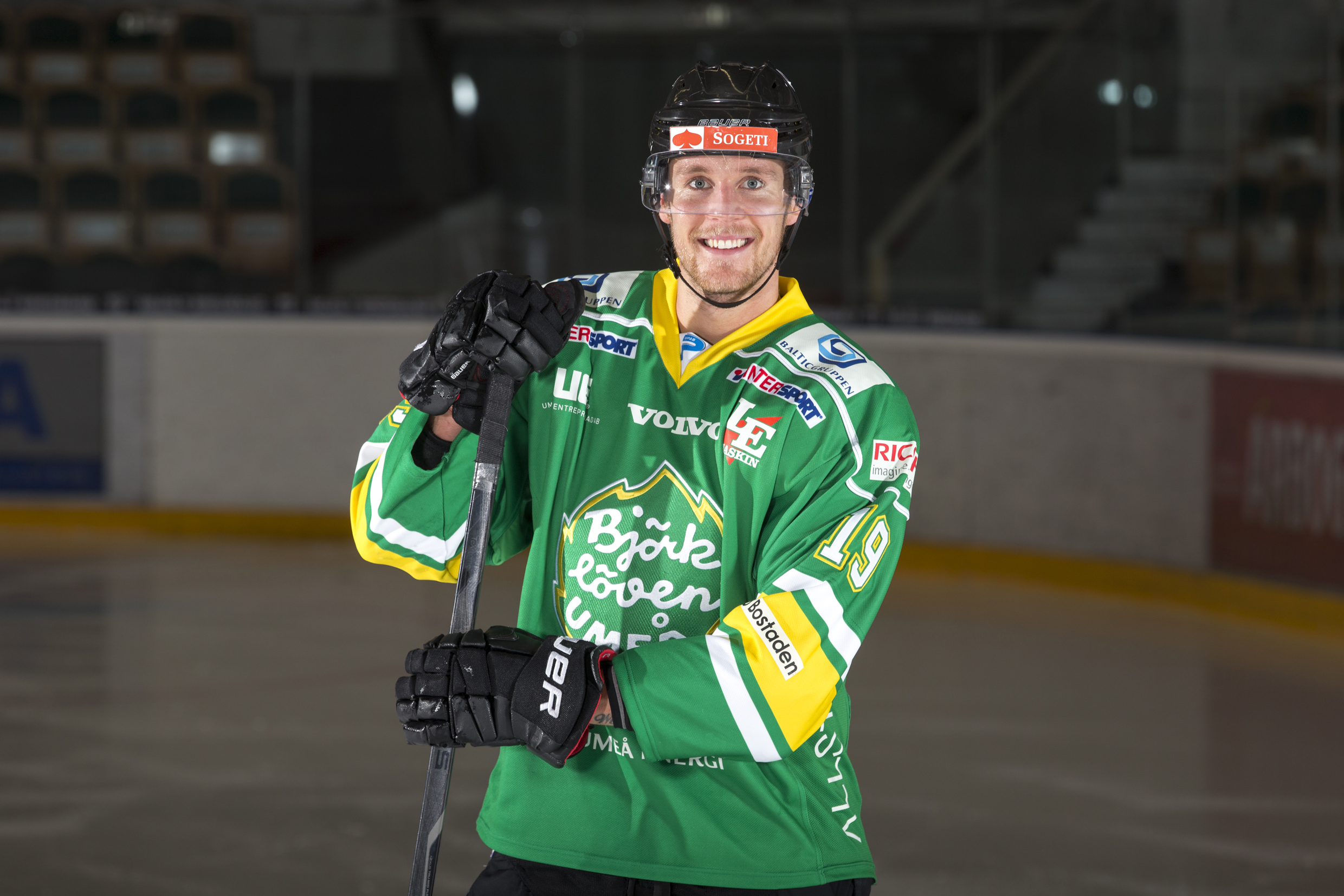 Ishockeyspelaren William Quist.